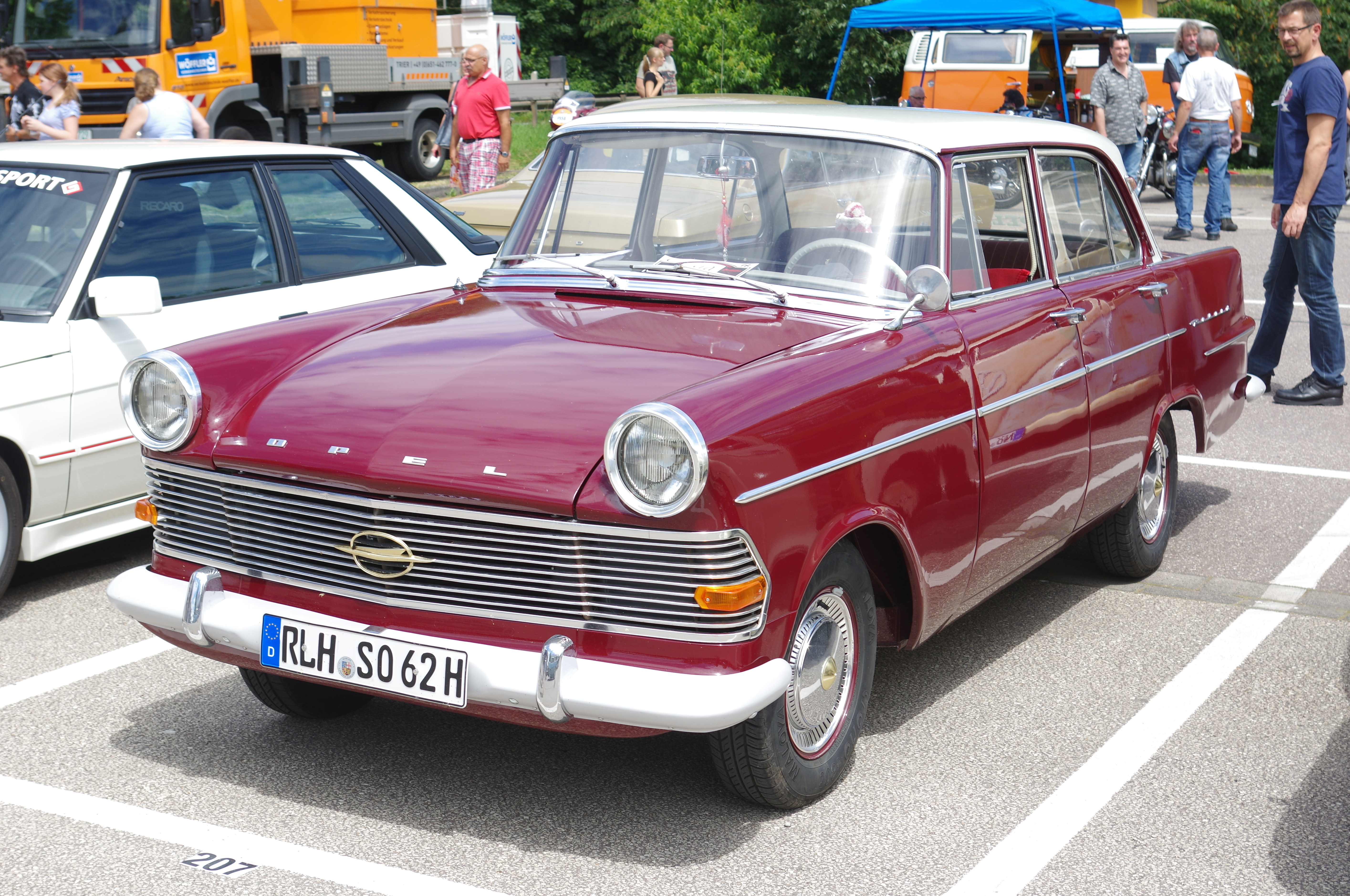 Opel Rekord P2, 1962, 4 Zyl. 1700 cm³, 55 PS, 32. Internationales Oldtimer Treffen Konz 2016, Das Nummernschild ist verfälscht!